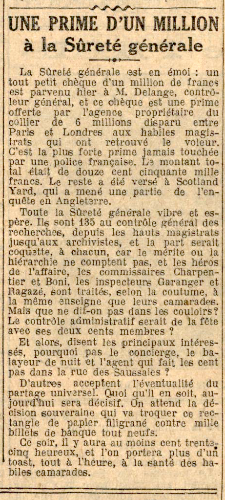 À la suite de 'l'affaire du vol du collier de 6 millions", Cartier verse une prime d'un million de francs aux agents de la Sûreté générale. L'inspecteur Bonny, ici désigné comme étant le "commissaire Boni", a été l'un des artisans de ce succès. Le Journal, 16 mai 1928.